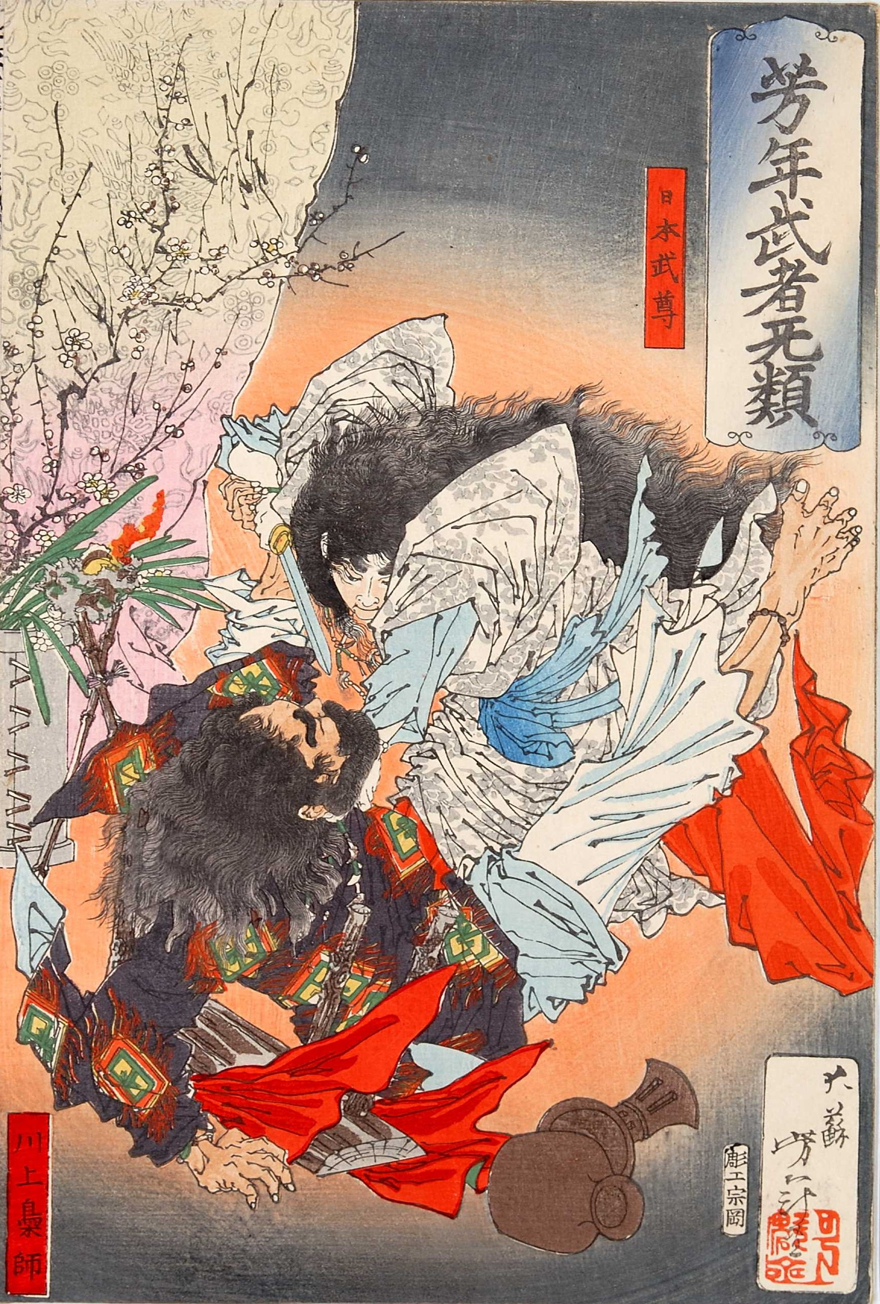 日本武尊 川上梟帥 月岡芳年画「芳年武者无類」。『日本書紀』に、397年に日本武尊が熊襲の首長である川上梟帥（古事記では熊曾建）を討ったとある